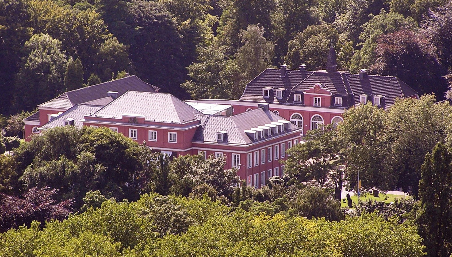 Castle "Schloss Oberhausen" from the Gasometer, Oberhausen